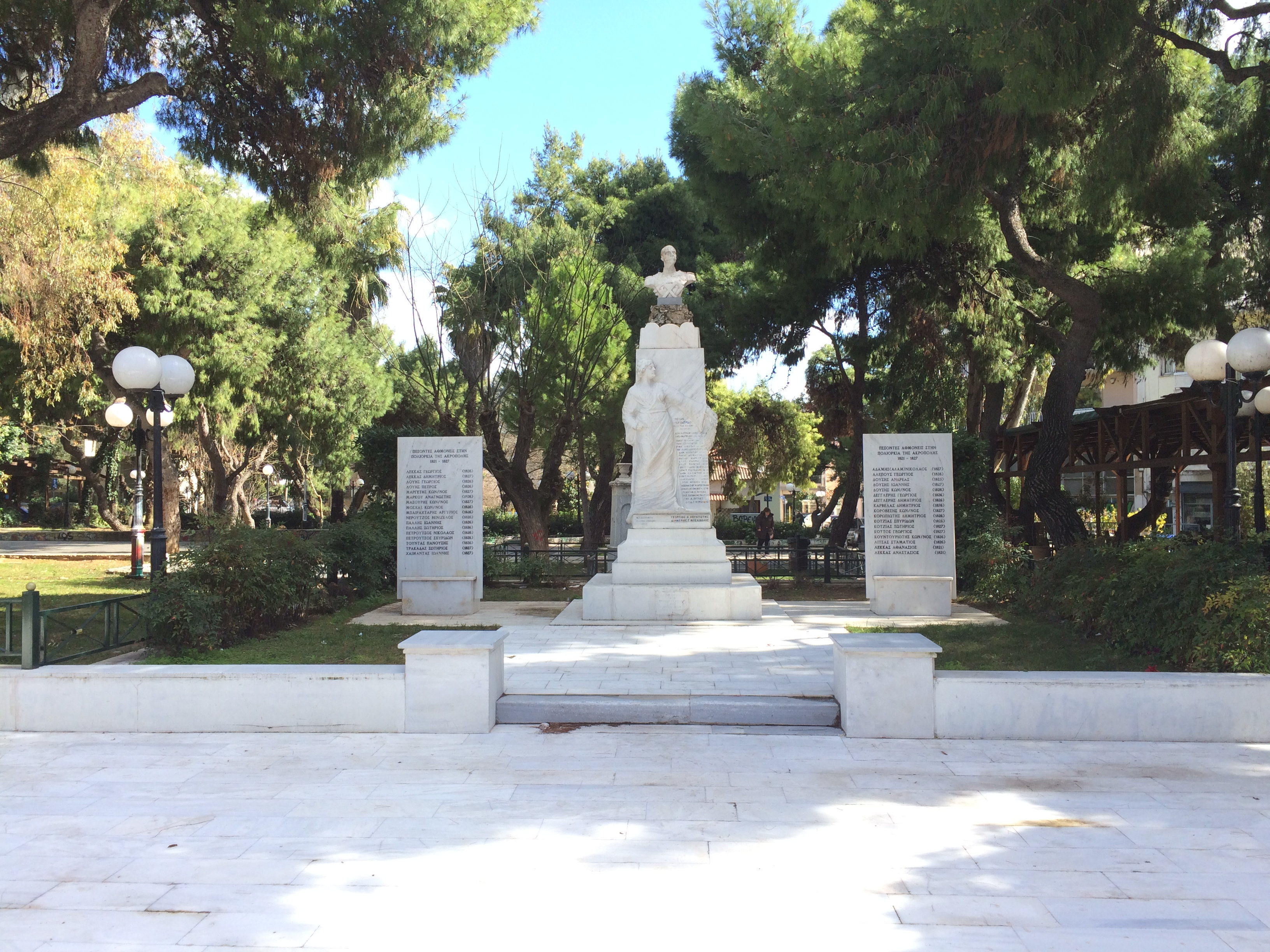 Πλατεία Ηρωών Αμαρουσίου